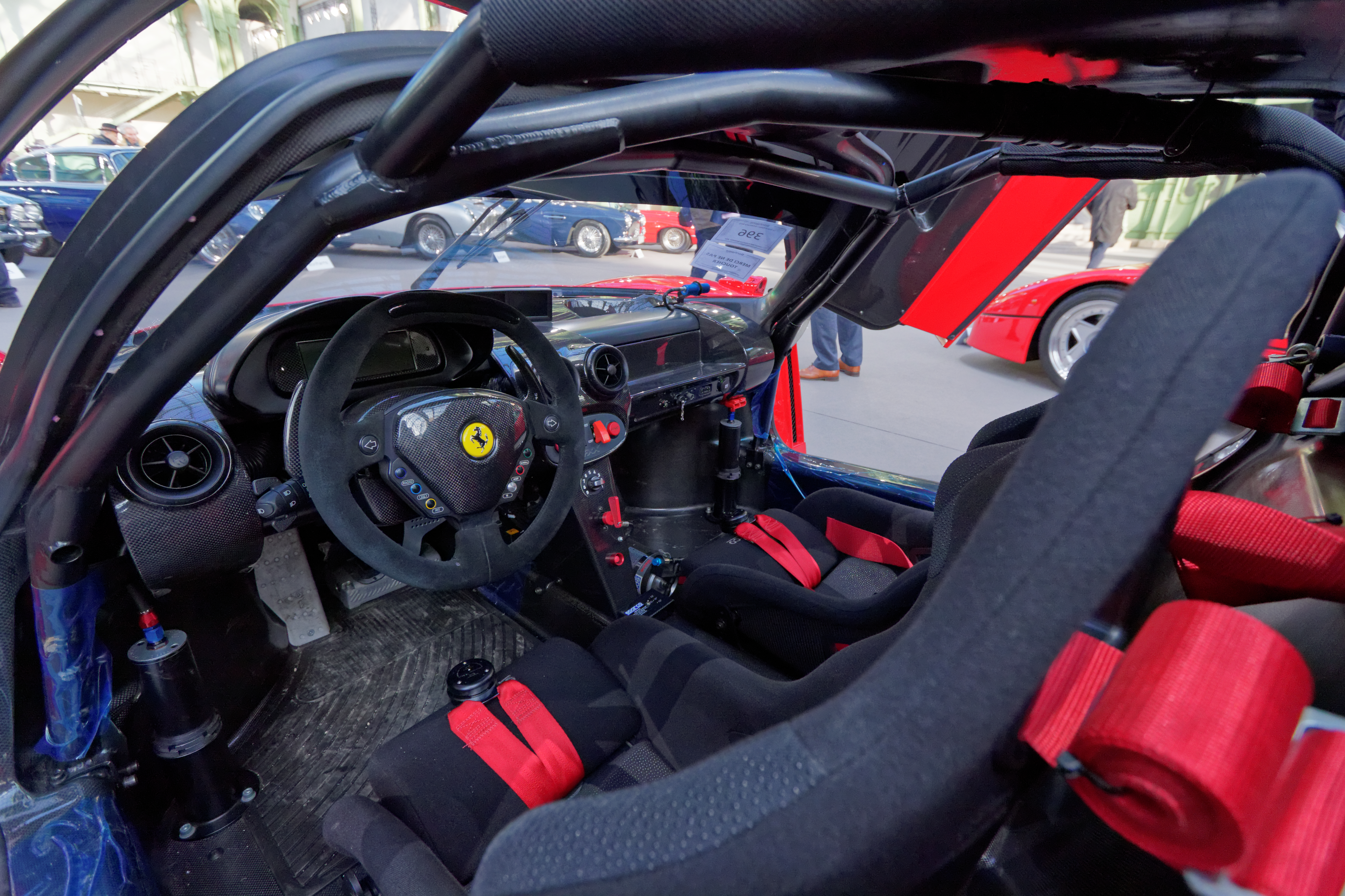 Un des véhicules présenté lors de la vente aux enchères Bonhams 2015 au Grand Palais de Paris.